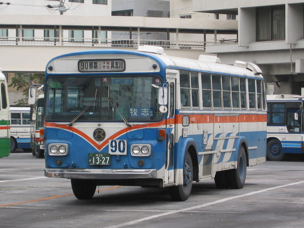 Ryukyu Bus car at Naha Bus Terminal, Okinawa.